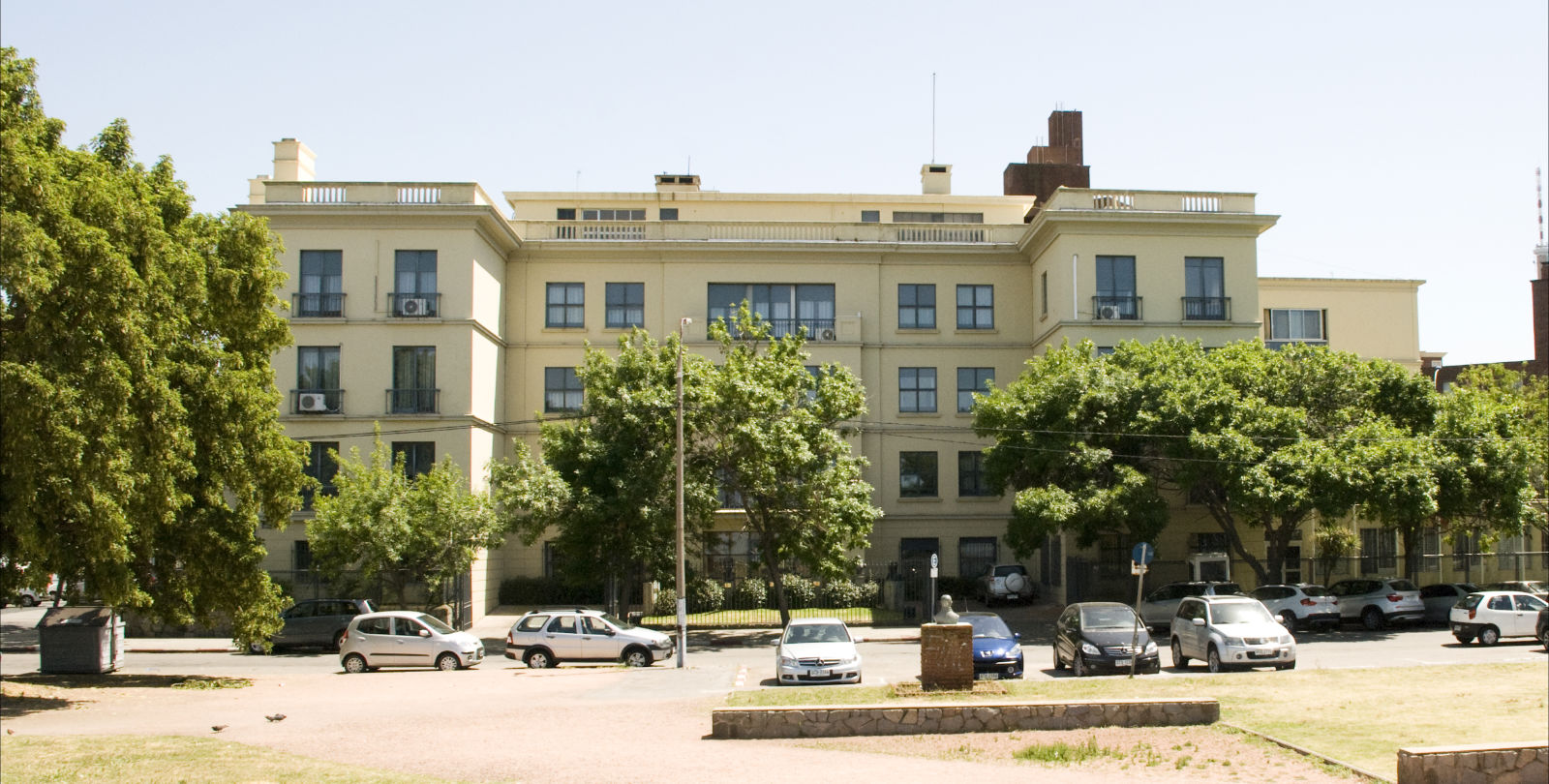 Fachada de la sede de la Secretaría General de la ALADI